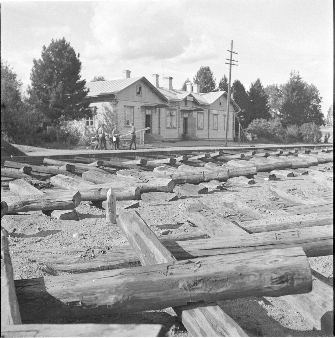 Инкиля